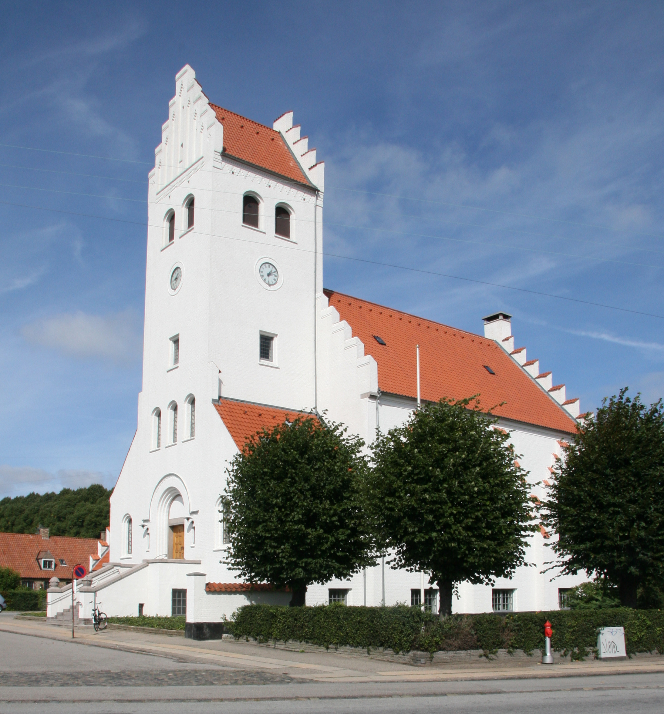 Grøndalskirken, Copenhagen, Denmark. Grøndalskirken